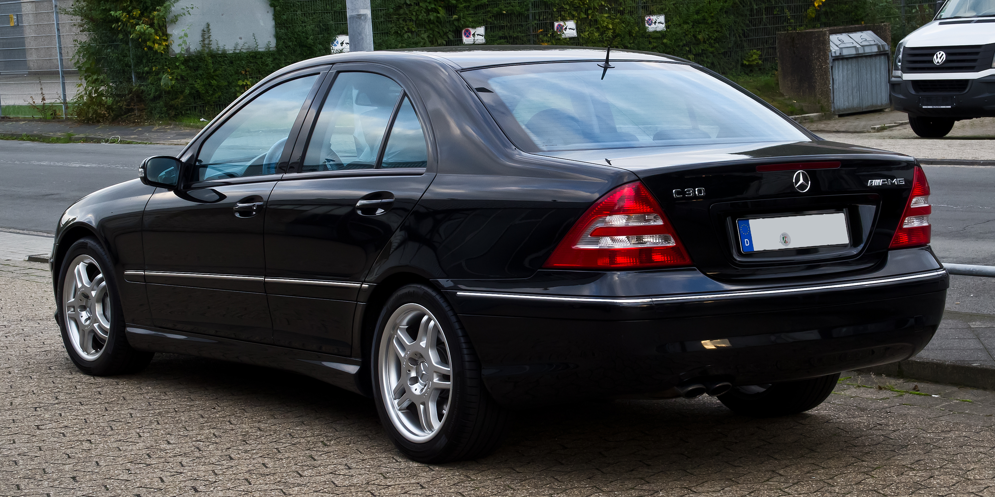 Mercedes-Benz C 30 CDI AMG (W 203, Facelift)